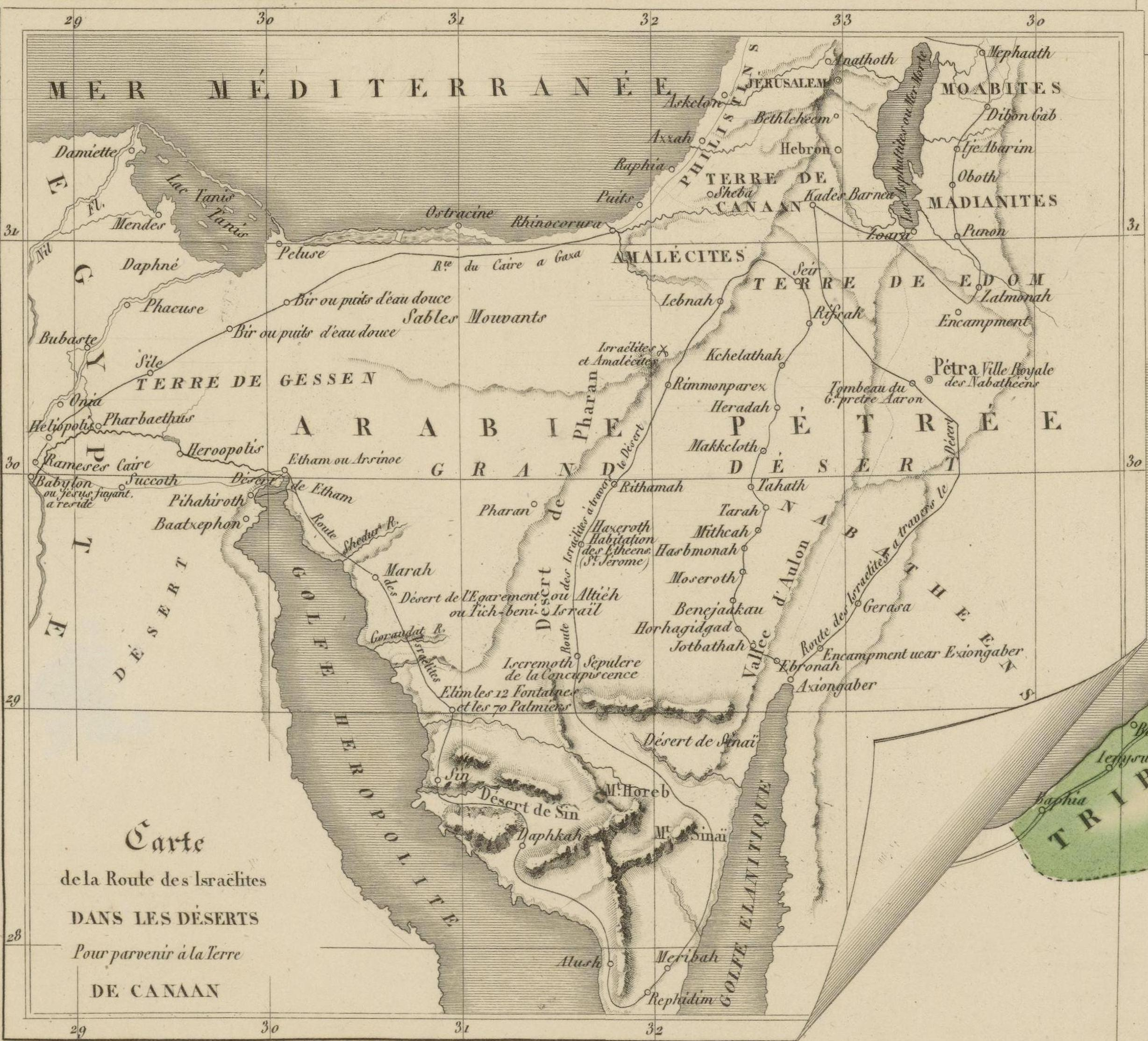 Carte de la Palestine : pour servir à l'intelligence de la Sainte Écriture et particulièrement à l'histoire de la Notre Seigneur Jésus-Christ / dressée par A. Toussaint. Échelle(s) : [ca 1:488 000], 8 lieues communes de France [= 7,3 cm]. E 34°18' - E 36°19' / N 33°30' - N 31°20'.